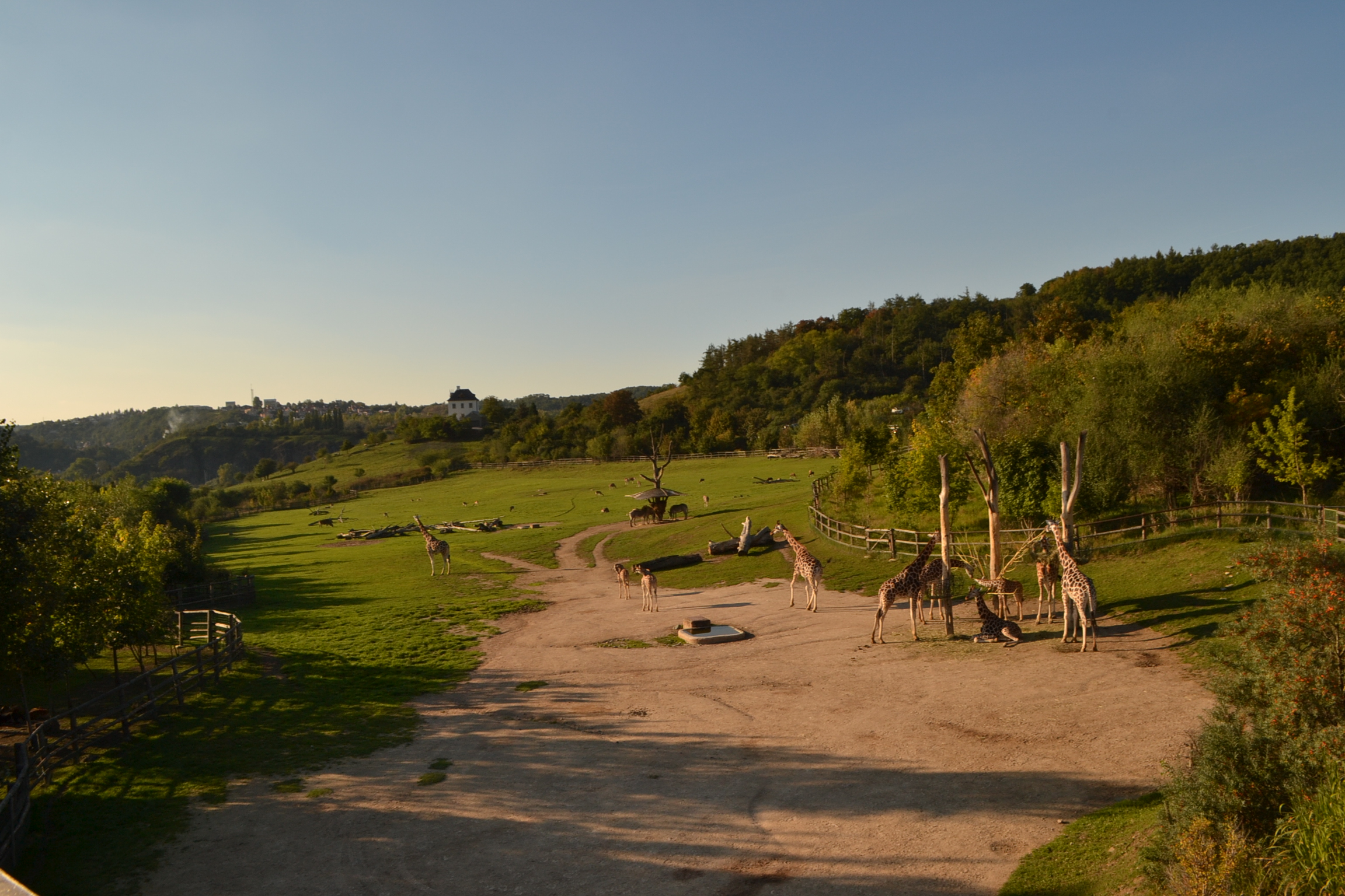 výběh žiraf, zeber atd. v ZOO Praha